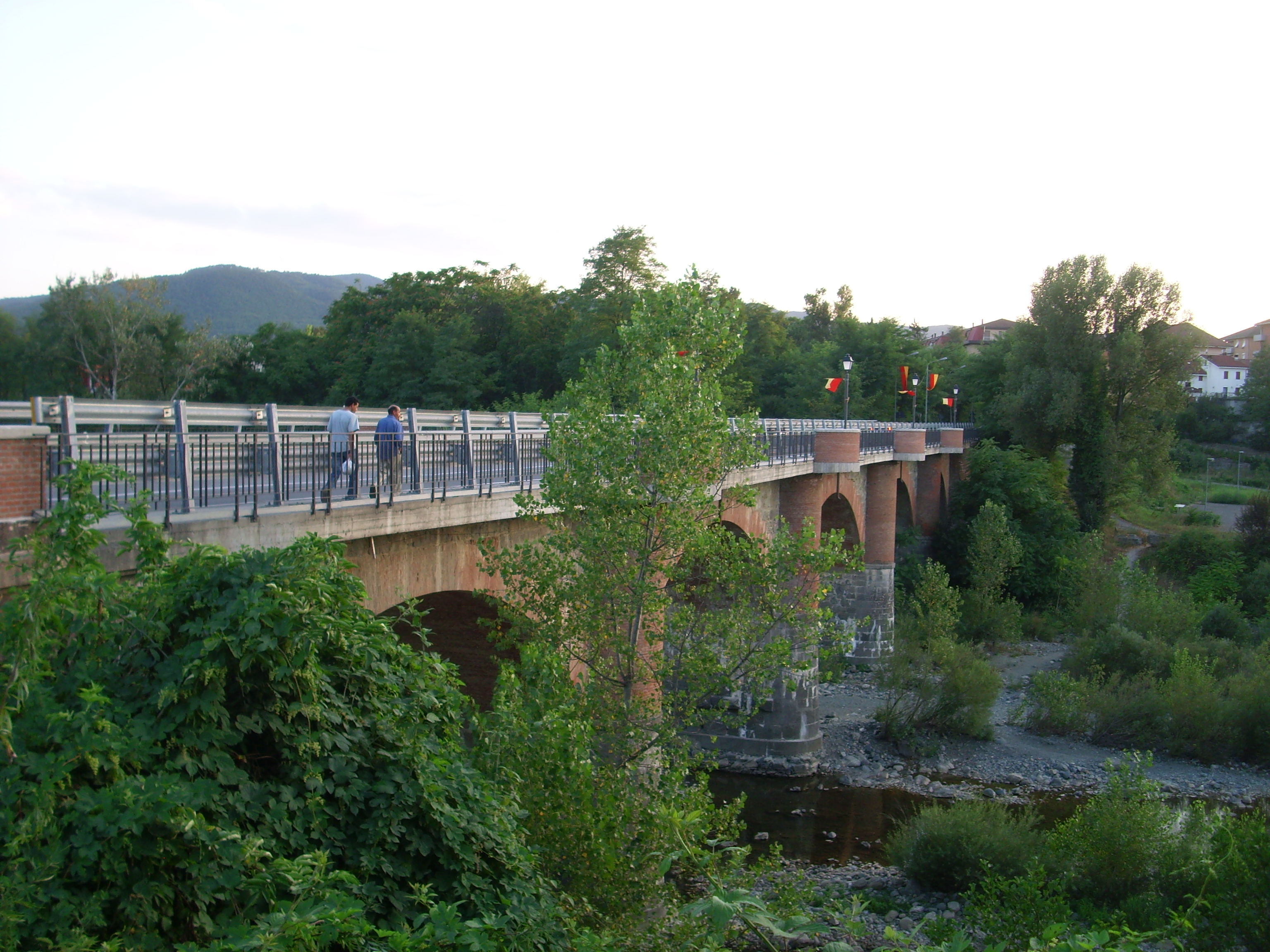 Il ponte di Molare sul torrente Orba, in provincia di Alessandria, segna il confine tra Molare ed Ovada.